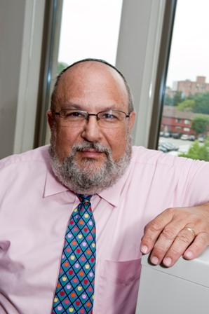 Daniel J. Lasker